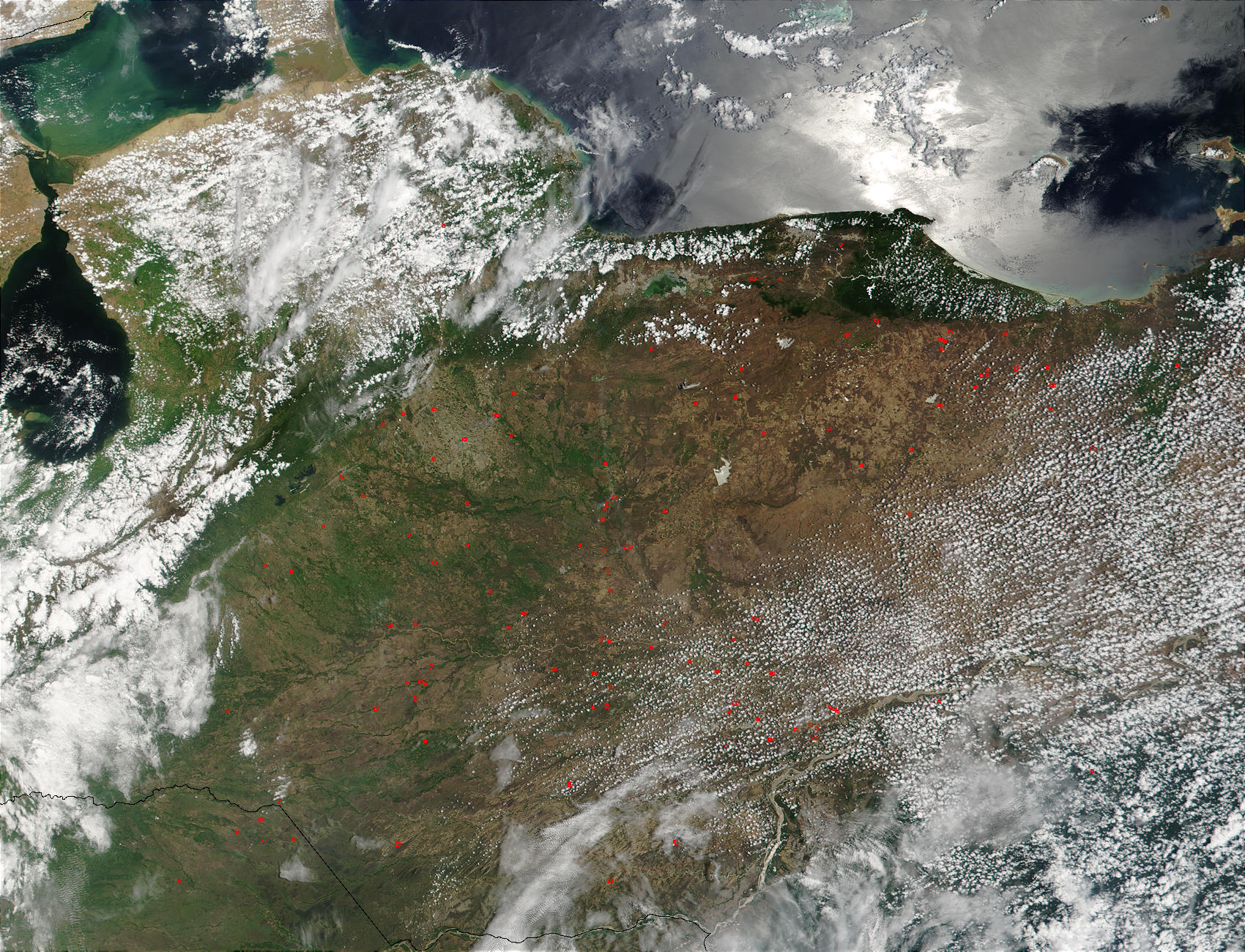 Bron